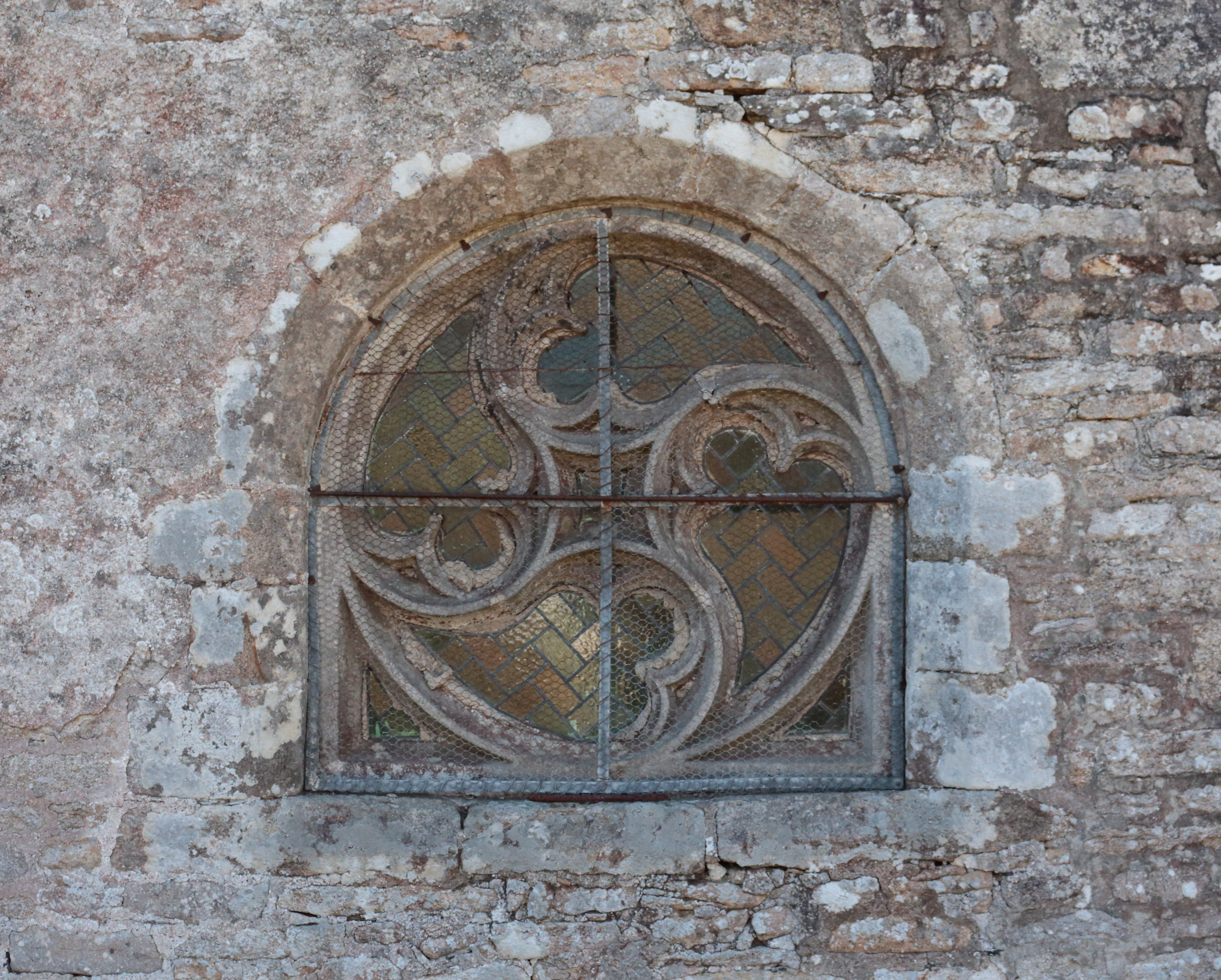 Fenêtre du bas-côté nord la chapelle Notre-Dame de Locmaria-an-Hent (commune de Saint-Yvi, Finistère, Bretagne, France.)